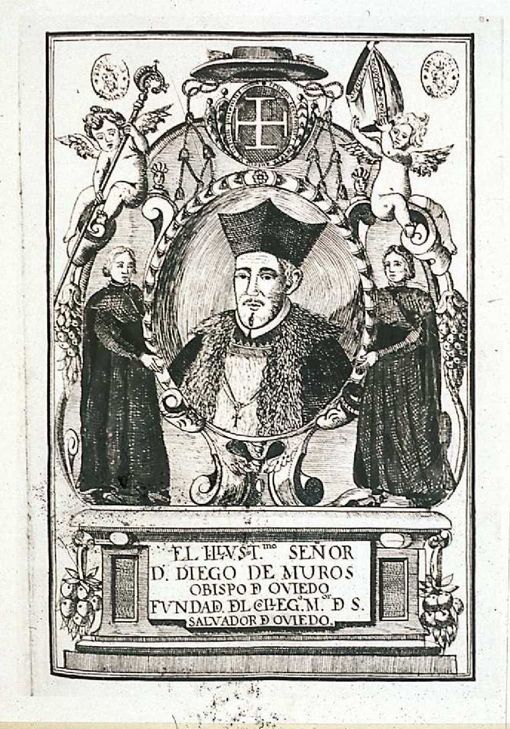 Diego de Muros. Inscripción: El Illvstmo. Señor D. Diego De Muros Obispo de Oviedo Fvndador del Colegio de S. Salvador De Oviedo. Biblioteca Nacional de España